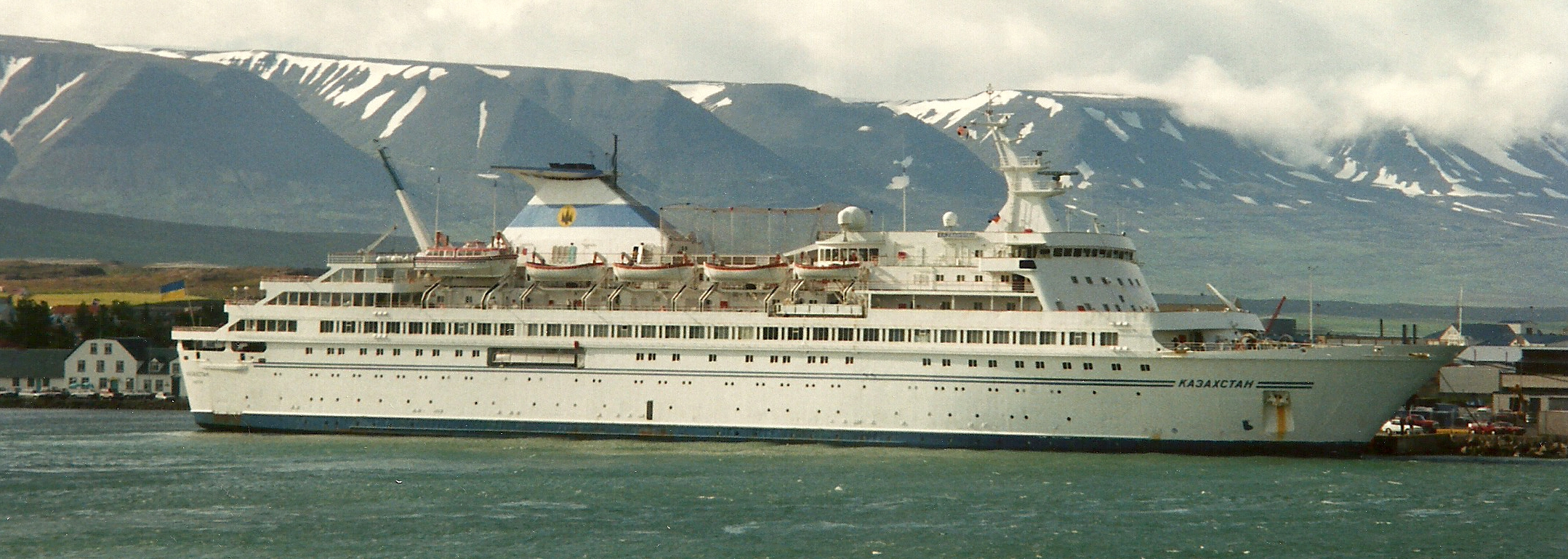 Hafen Akureyri Iceland